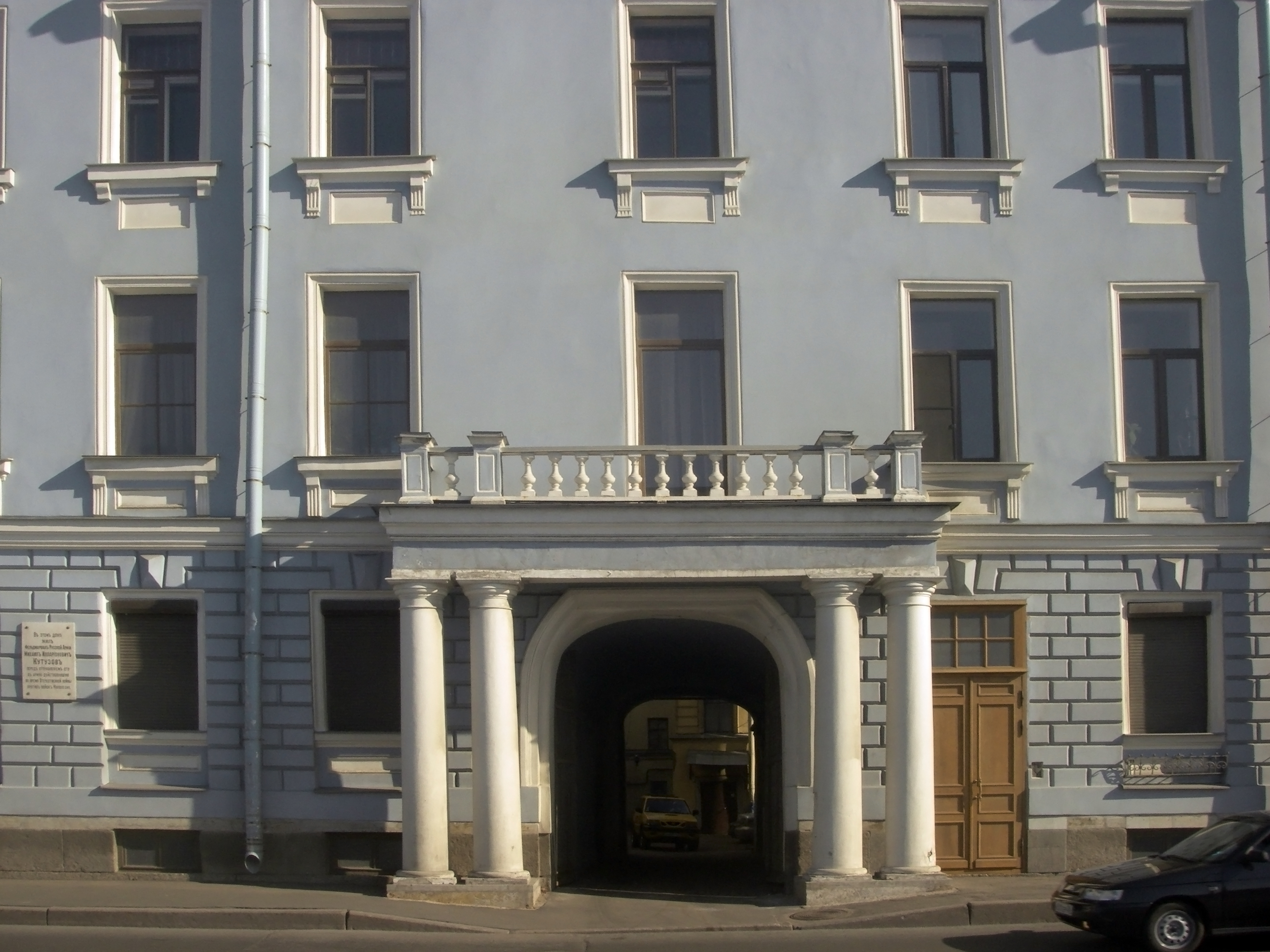 Дом Кутузова на набережной Невы. Табличка на стене: «Въ этомъ домѢ жилъ фельдмаршаъ Русской Армiи Михаилъ Илларiоновичъ Кутузовъ перед отправленiемъ его въ армiю дѢйствовашую во время Отечественной войны противъ войскъ Наполеона.»